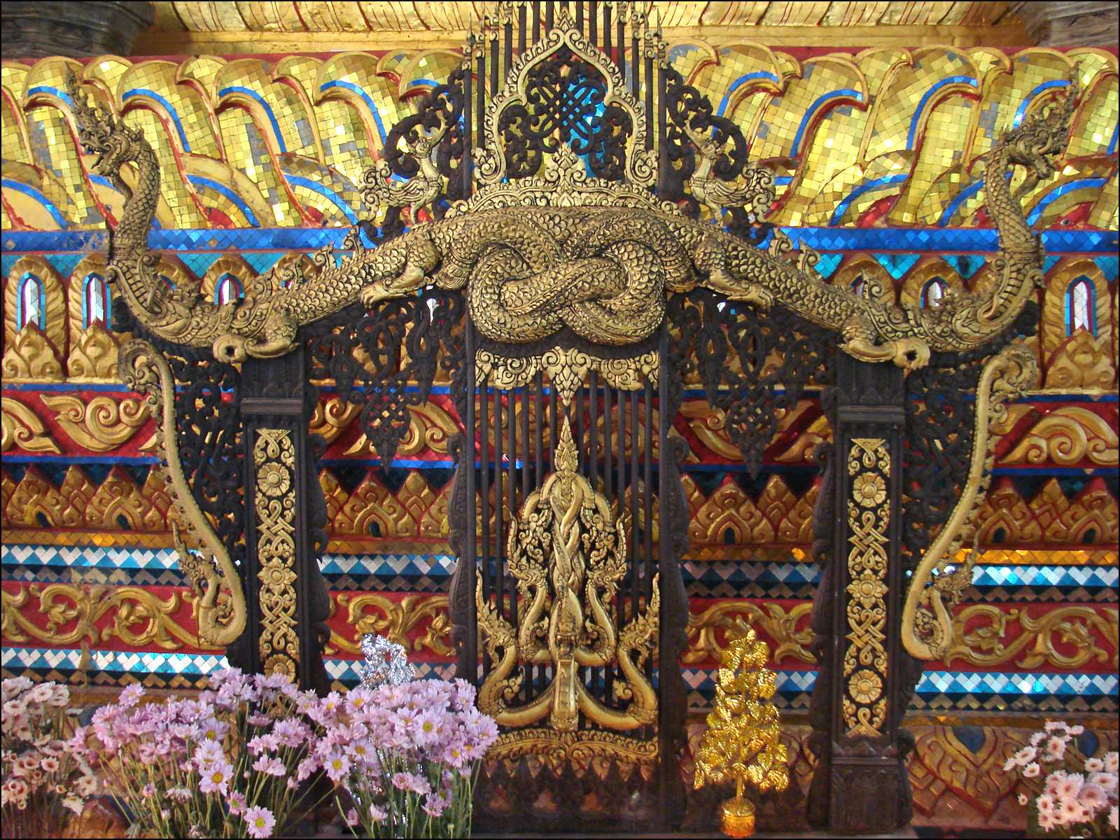 Le Vat Ong Theu est appelé également Pagode du Bouddha lourd. Il a été initialement construit au 16ème siècle par le roi Setthathirat, celui qui a construit le Grand Stupa (That Luang). La pagode a été détruite lors de l'invasion siamoise de 1828 puis reconstruite au 19ème siècle. Ce monastère est la résidence du Patriarche Suprême du Laos.